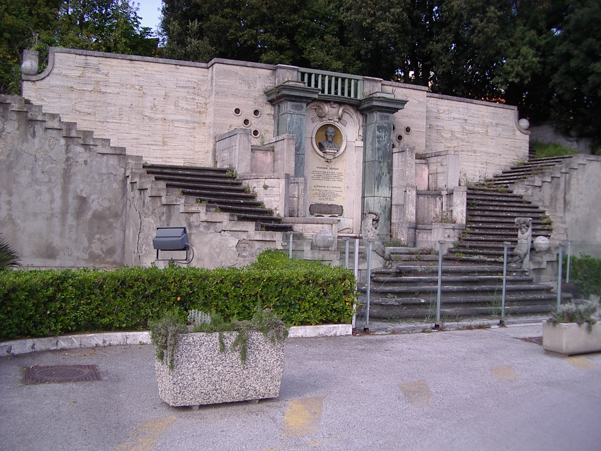 Monument Giovanni Battista Buitoni Sansepolcro Toscane Italy